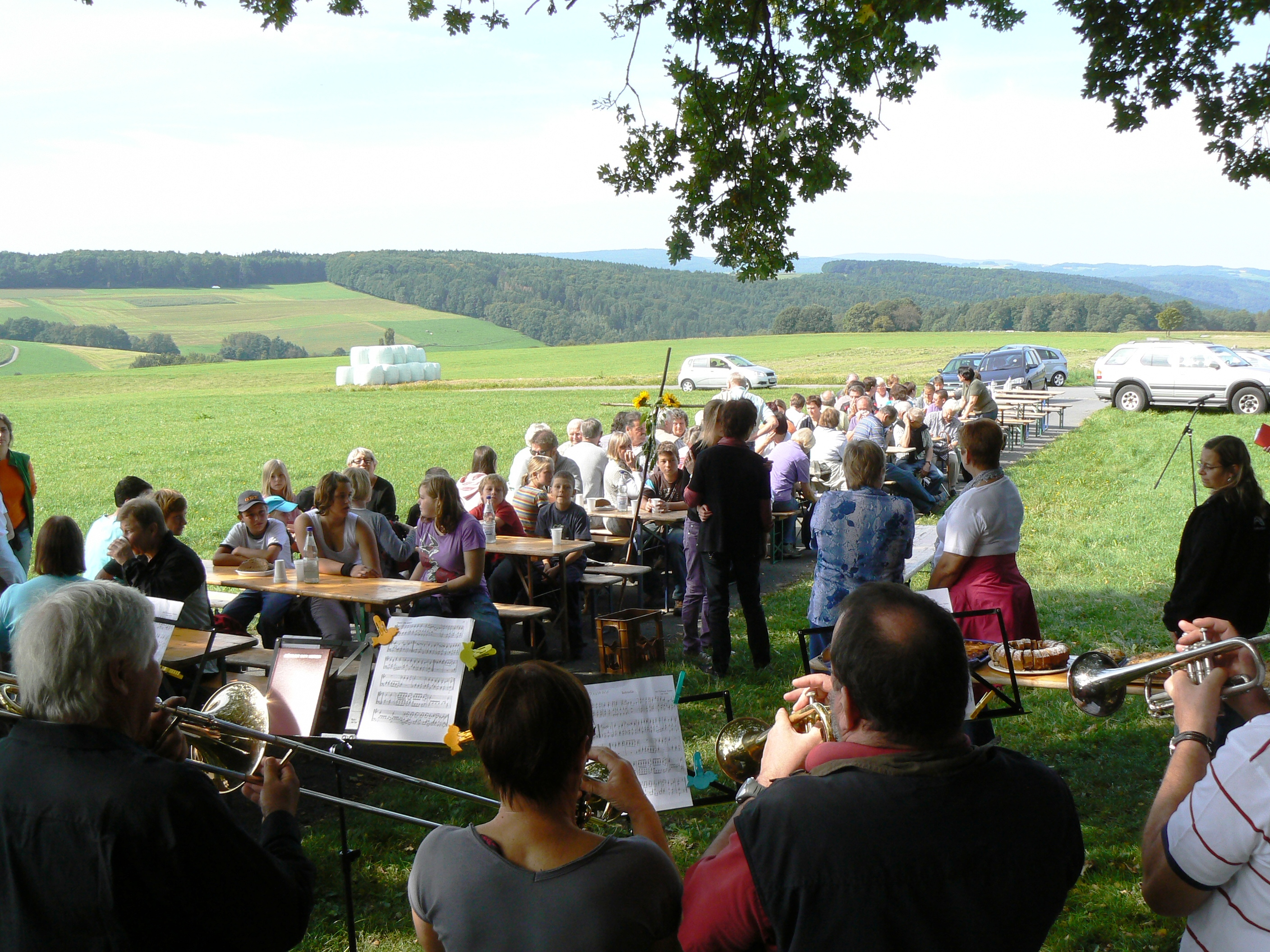 Feldgottesdienst der Ev. Kirchengemeinde Vielbrunn mit Kimbach am Käsebrünnchen auf der Höhe über Kimbach.